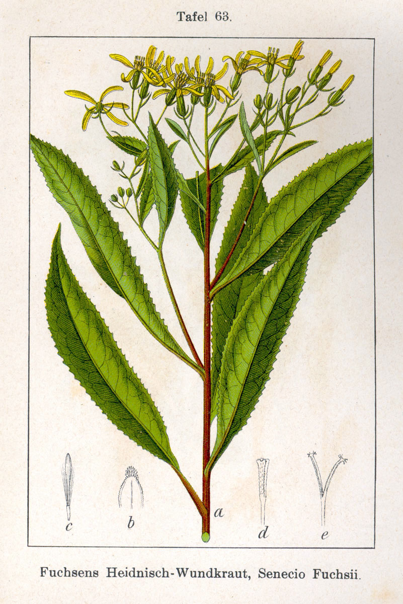 Senecio ovatus (P. Gaertn., B. Mey. & Scherb.) Willd., syn. Senecio fuchsii C. C. Gmel. Original Description Fuchsens Heidnisch-Wundkraut, Senecio fuchsii